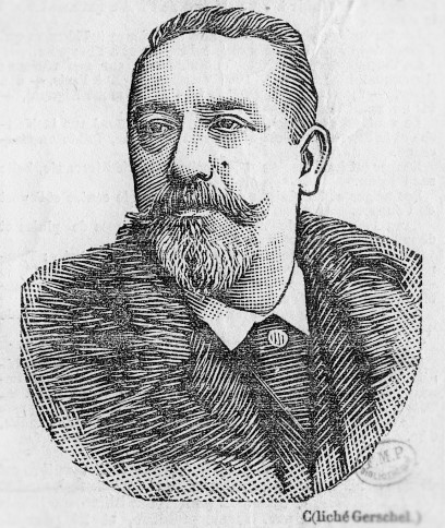 Regnard, Paul s.d. Cote : CIPA0472 Photographe : Gerschel Technique : Gravure - Bois